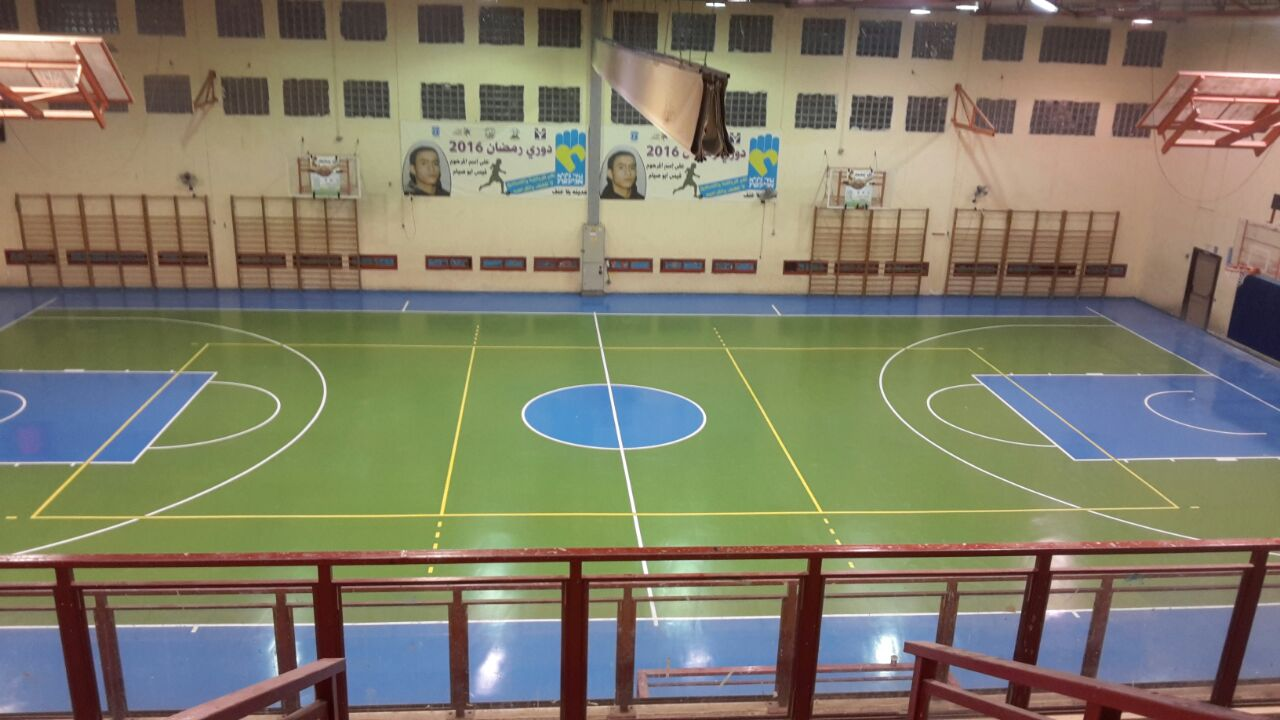 אולם ספורט לכדורסל בעיר רהט